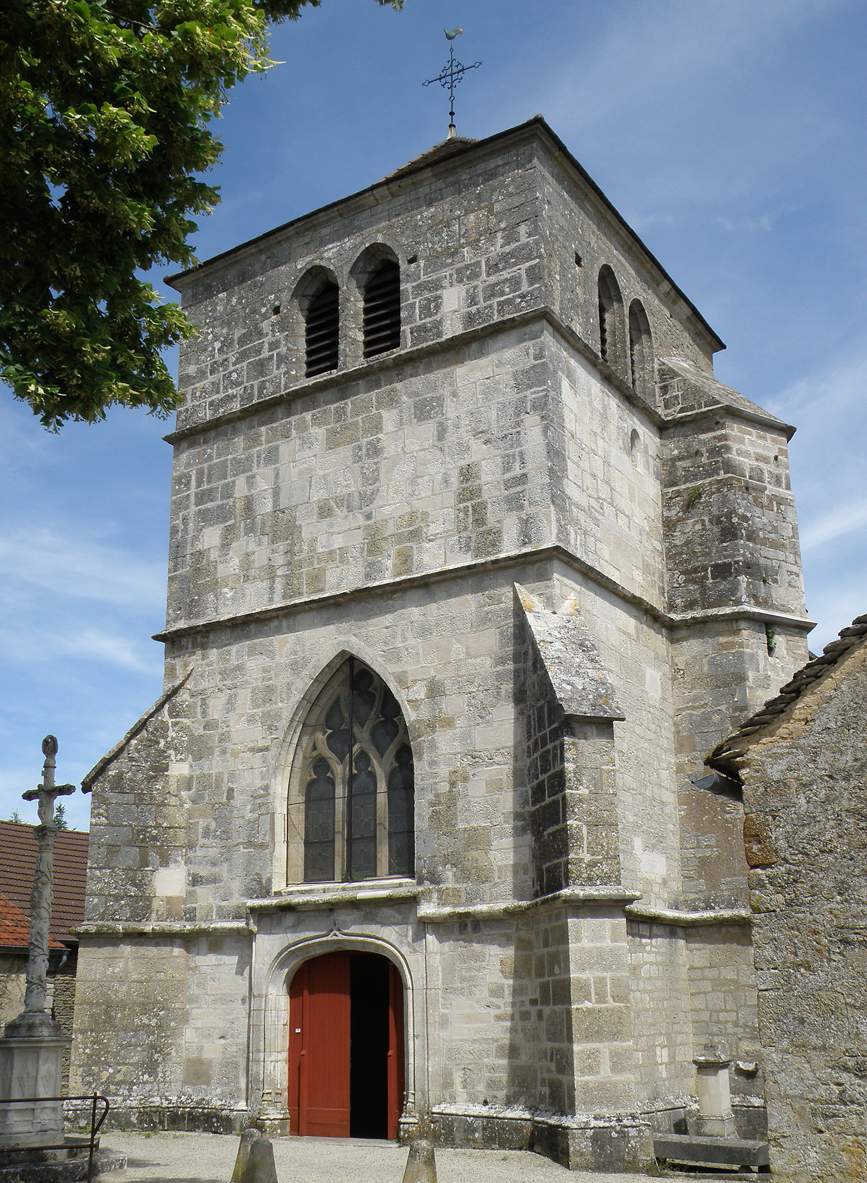 Saint-Romain (Côte-d'Or, Bourgogne, France). Église Saint-Romain, Saint-Romain Haut.